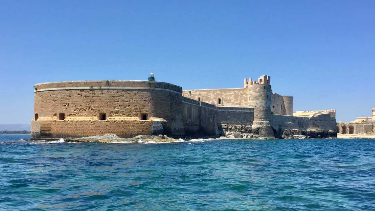 Vista del Castello Maniace (Siracusa)